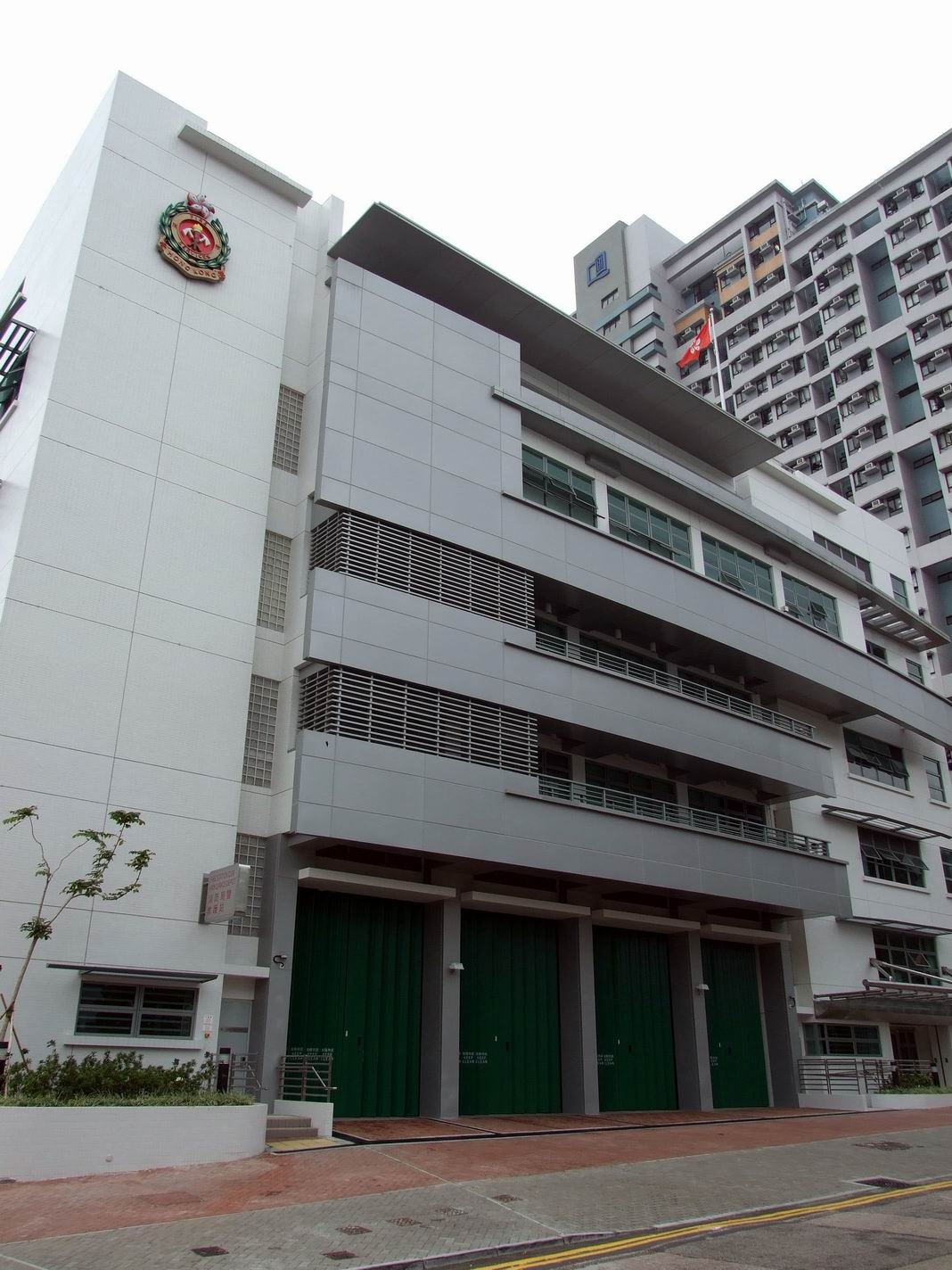 九龍塘消防局暨救護站